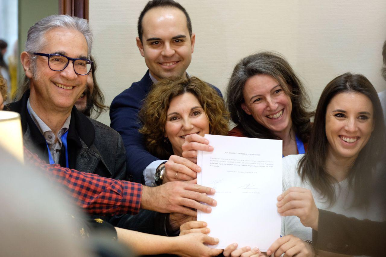 El delegado del Área de Desarrollo Urbano Sostenible, José Manuel Calvo ha participado esta mañana junto a representantes de los ayuntamientos de Barcelona, Valencia, Córdoba, Cádiz, Zaragoza, A Coruña y Santiago de Compostela, en la presentación en el Registro del Congreso, de una Proposición de Ley para la regulación de los alquileres abusivos y la mejora de las garantías y el acceso a la vivienda en alquiler.